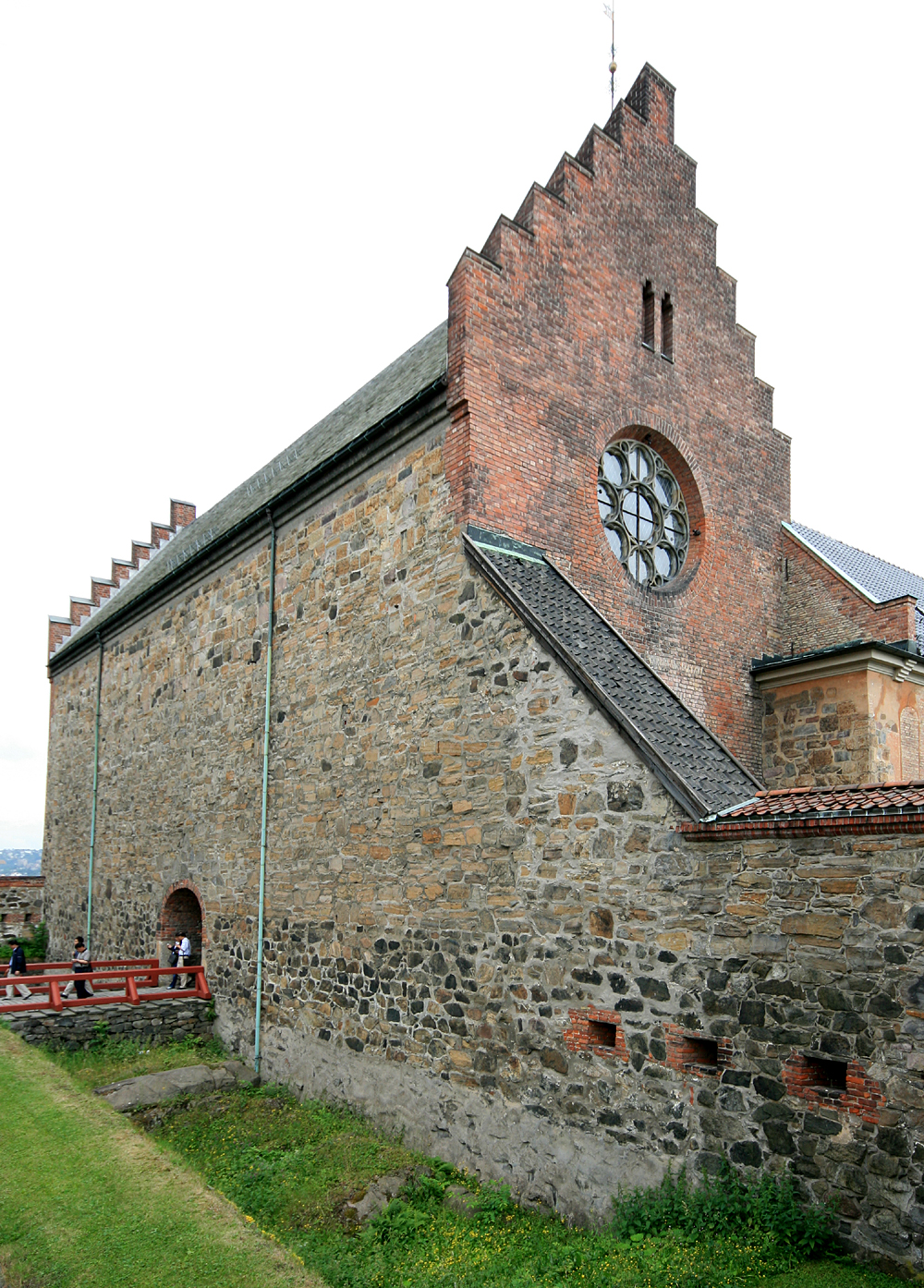 Nordfløyen (Olavshallen), Akershus festning, Oslo. Bygd som kongshall ca. 1300. Restaurert 1917 ved arkitekt Holger Sinding-Larsen.